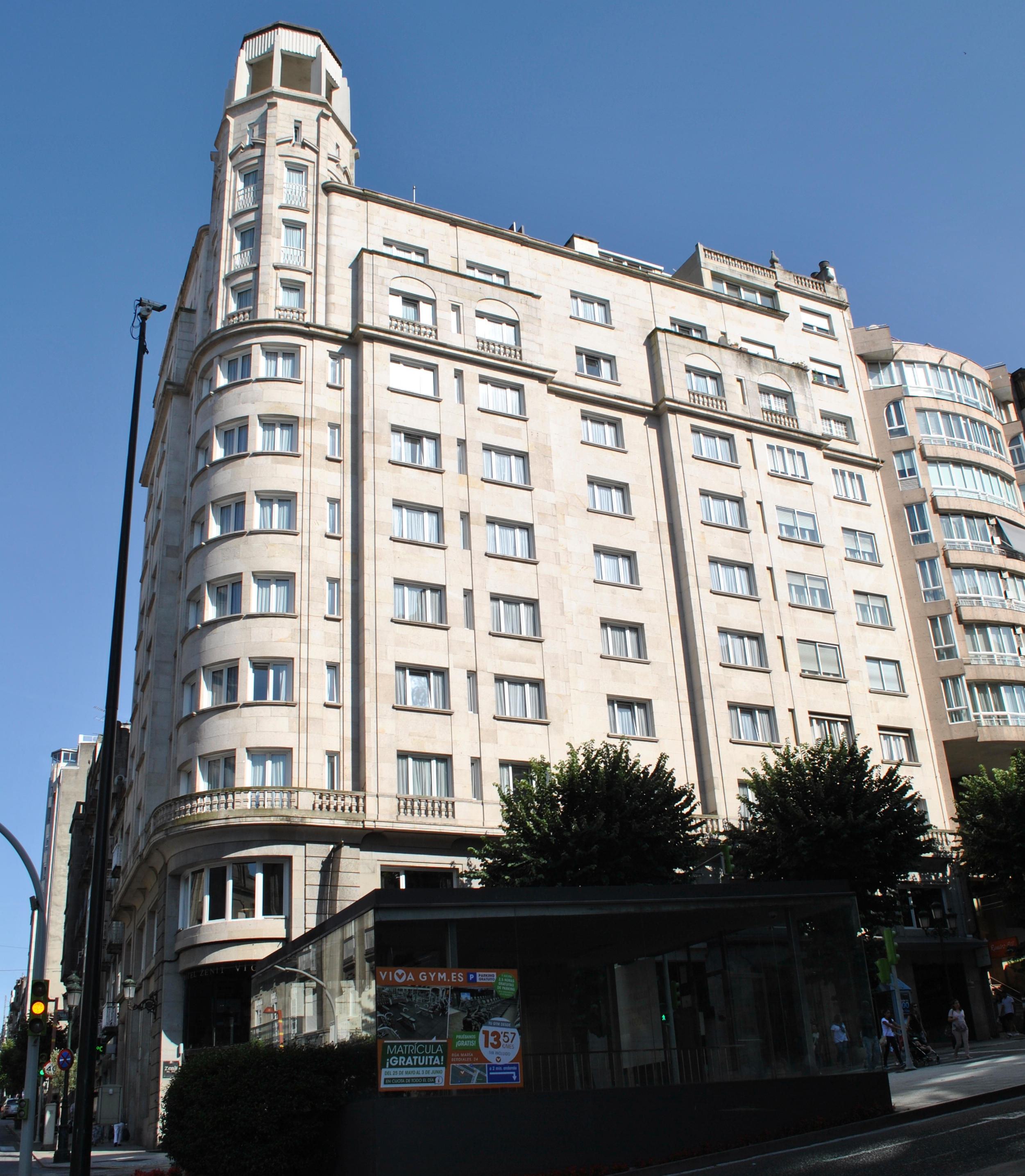 Véxase o título e as categorías.